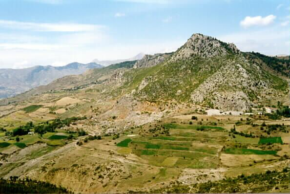 Bergland Kolonja in Südalbanien